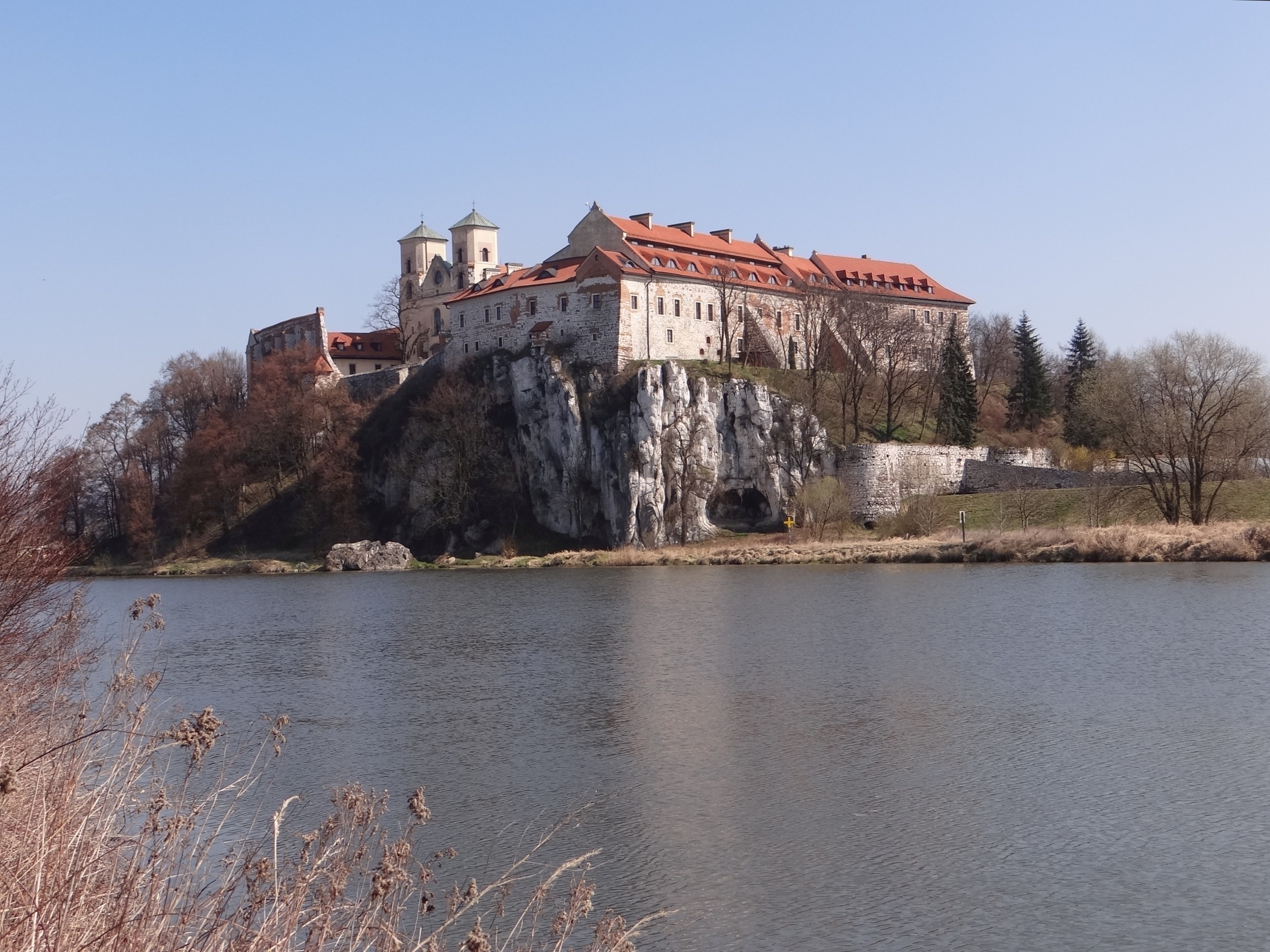 Opactwo Benedyktynów w Tyńcu na Klasztornej Górze